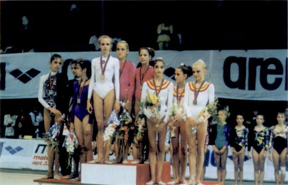 Las gimnastas españolas Carolina Borrell, Rosabel Espinosa y Bárbara Plaza con el bronce en el podio por equipos del Campeonato Europeo Júnior de Gimnasia Rítmica de Lisboa en 1991. Con la medalla de plata está el equipo búlgaro (Zornitza Kalenska, Diana Popova e Iva Ivanova) y con el oro el equipo soviético (Ekaterina Serebrianskaya, Amina Zaripova y Elena Vitrichenko).